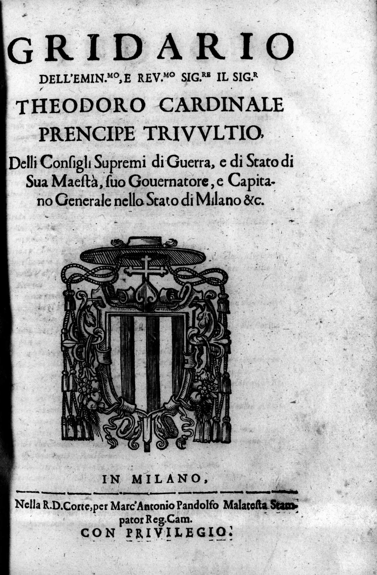 Frontespizio